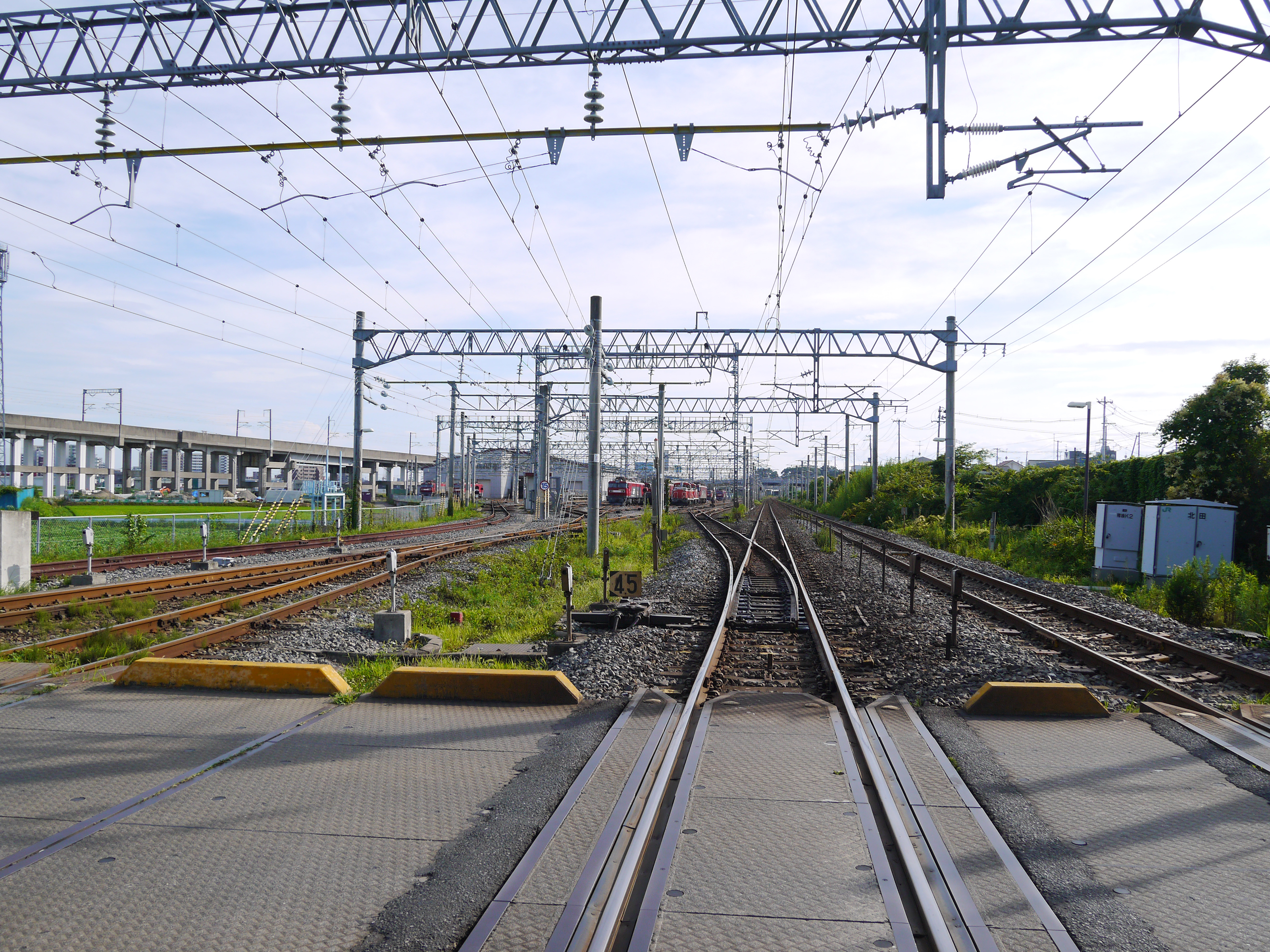 東北本線 東仙台信号場